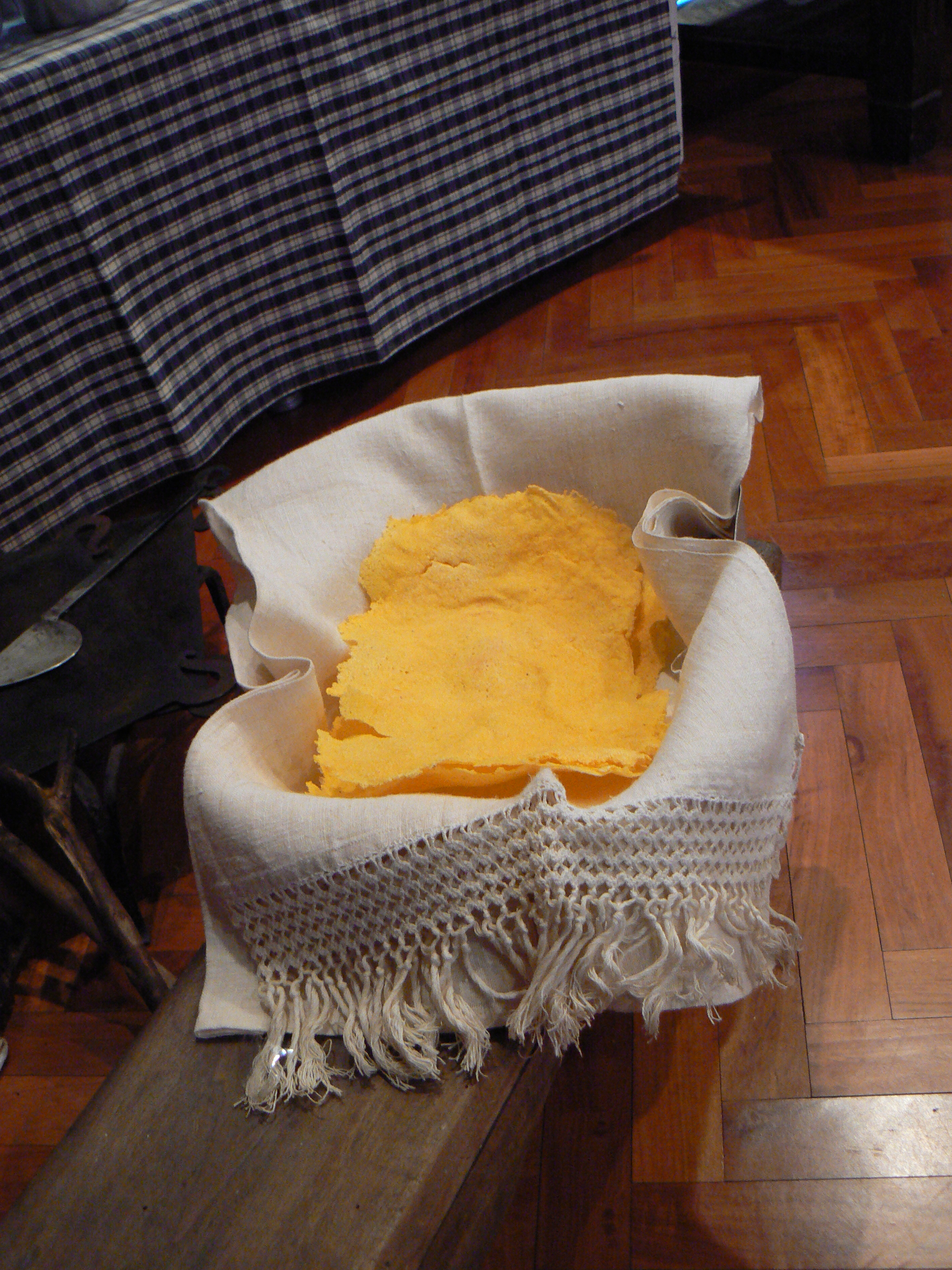 Esempio di (localmente: miassa). Conservato presso la collezione etnografica dedicata alla cultura materiale della Regione Valle d'Aosta presso la Biblioteca comunale di Donnas, Valle d'Aosta, Italia. Foto scattata durante la Fiera di Sant'Orso di Donnas.